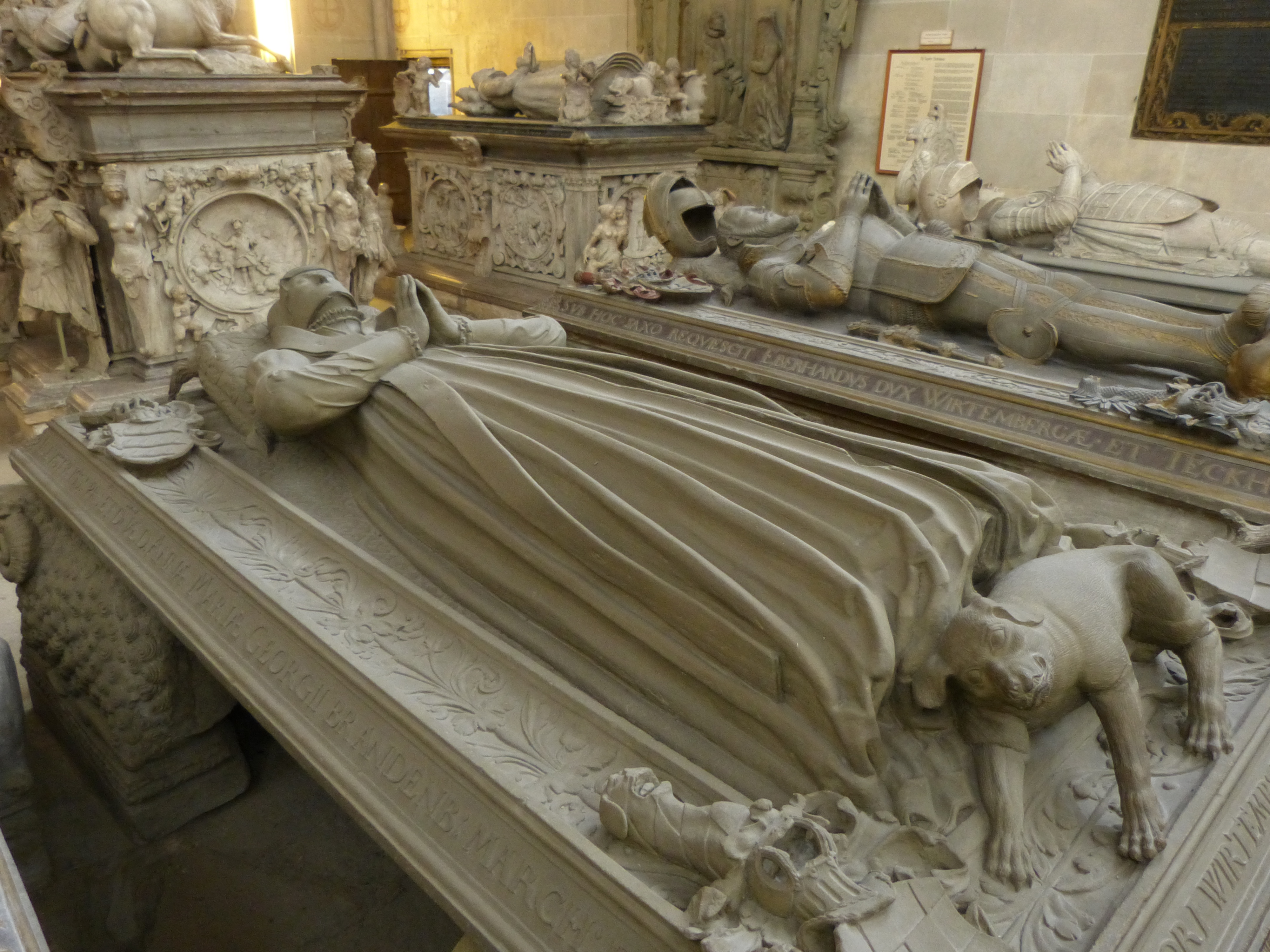 Grablege in der Stiftskirche von Tübingen, Baden-Württembergl